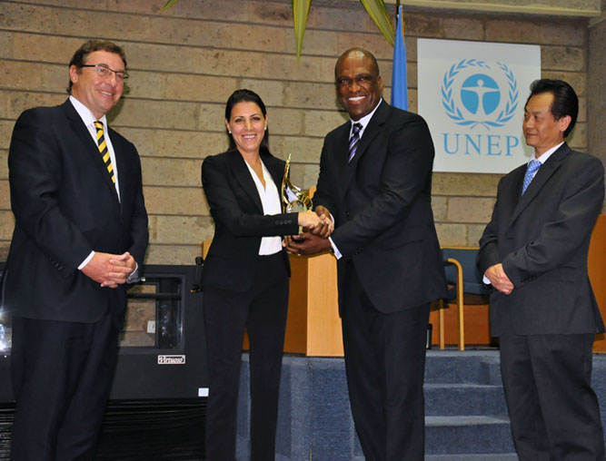 סיון מקבלת את "פרס החדשנות" מהאומות המאוחדות